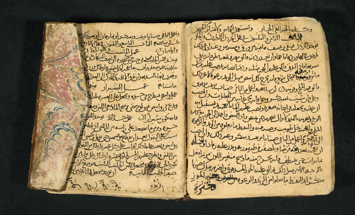 صفحتان من مخطوطة كتاب الطبيخ لابن سيّار الورّاق الموجودة في المكتبة الوطنية في فنلندة.